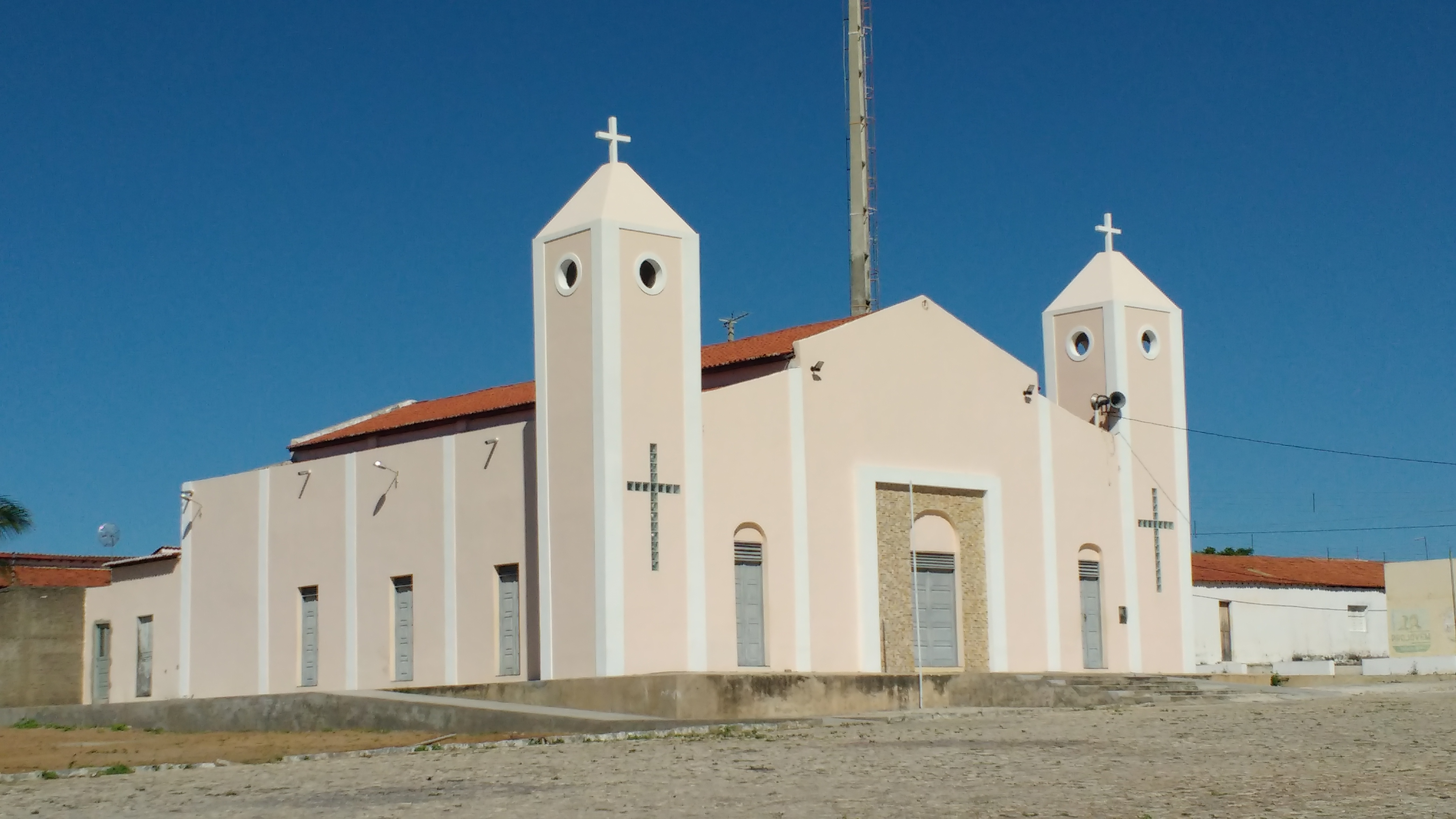 Capela de São João Batista, Vila Mata, distrito de Mata de São Braz, Tenente Ananias, Rio Grande do Norte (Brasil).